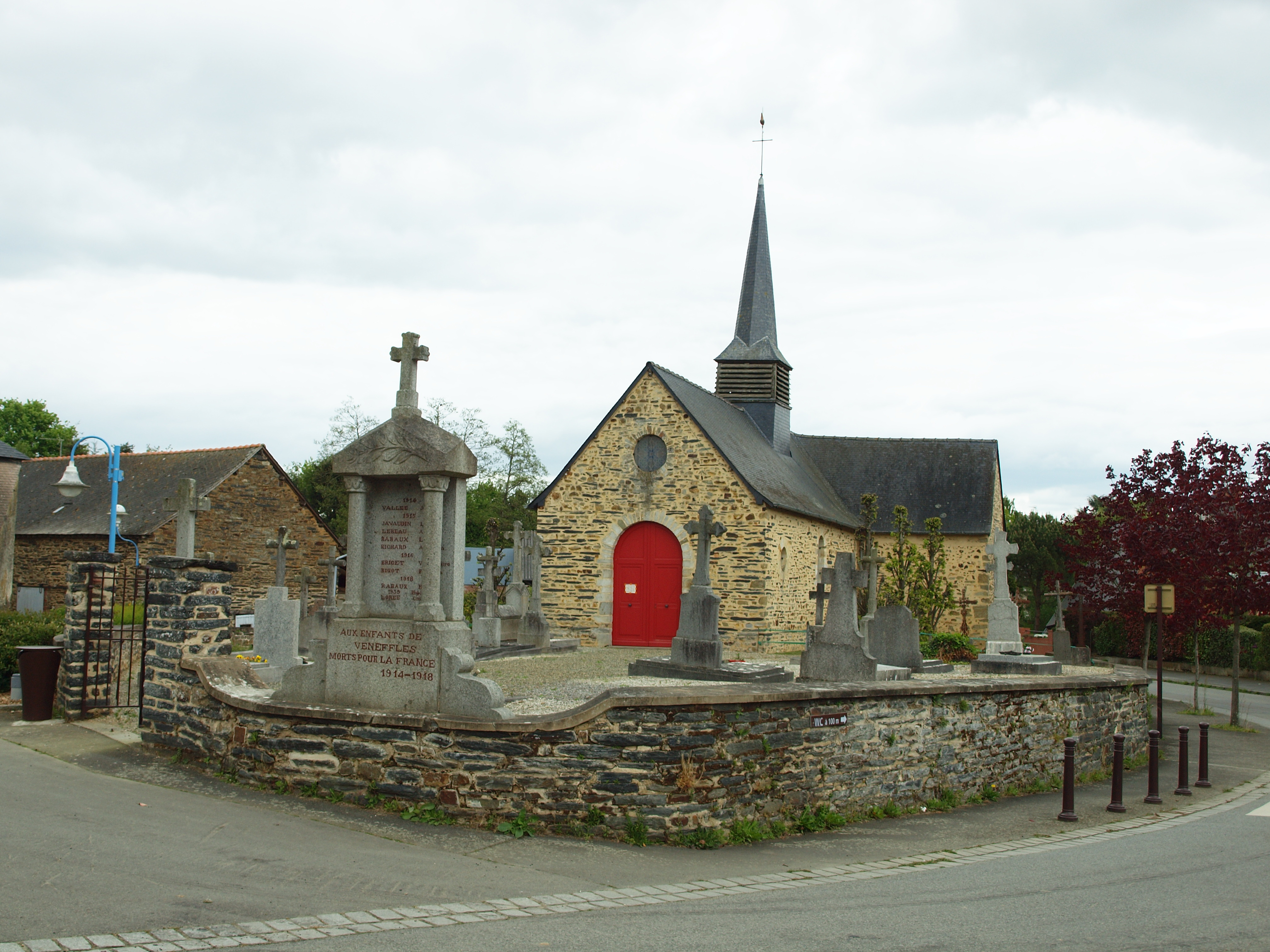 Veneffles (Châteaugiron, Ille-et-Vilaine, France)